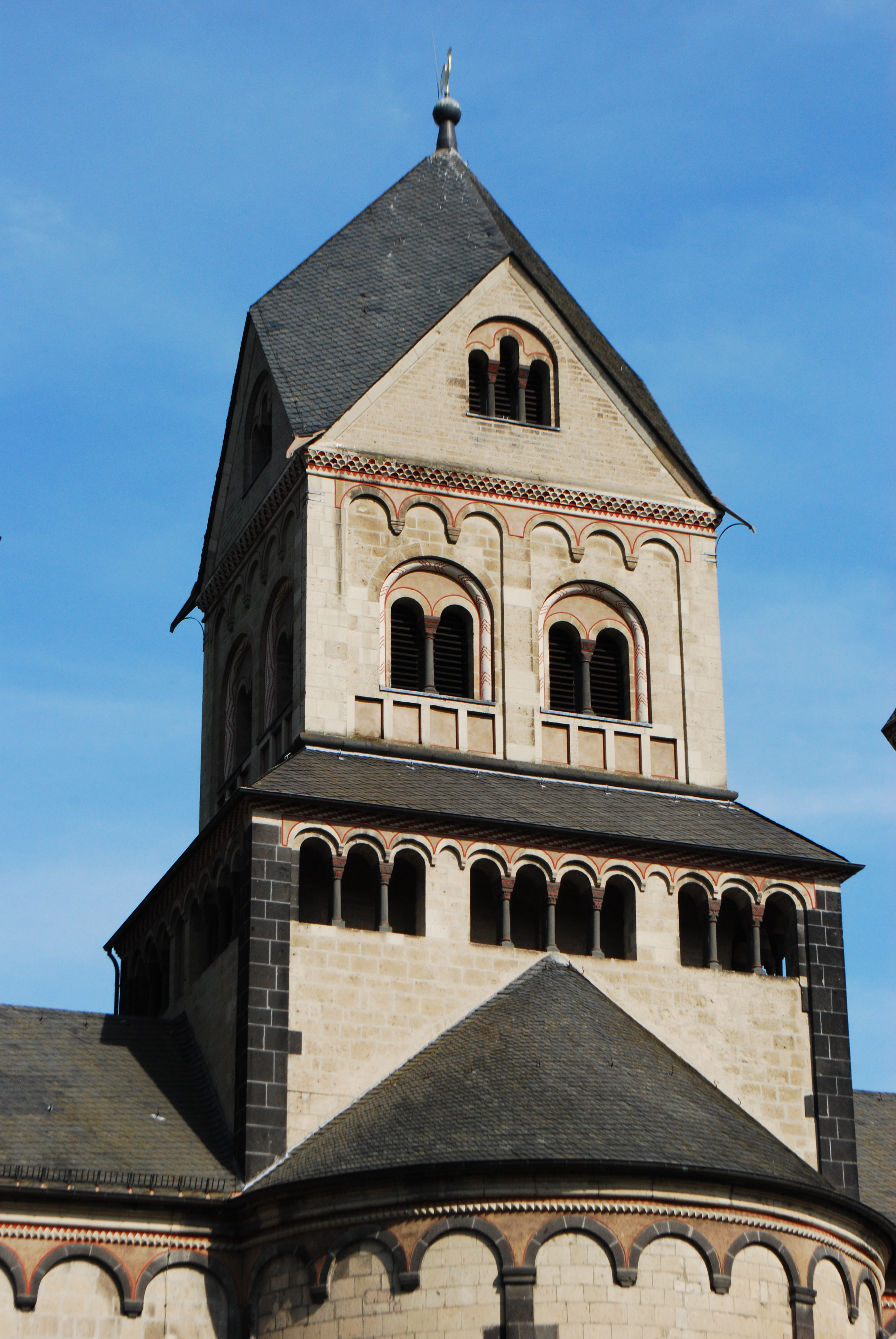 Vue extérieure de l'église abbatiale de Maria Laach.